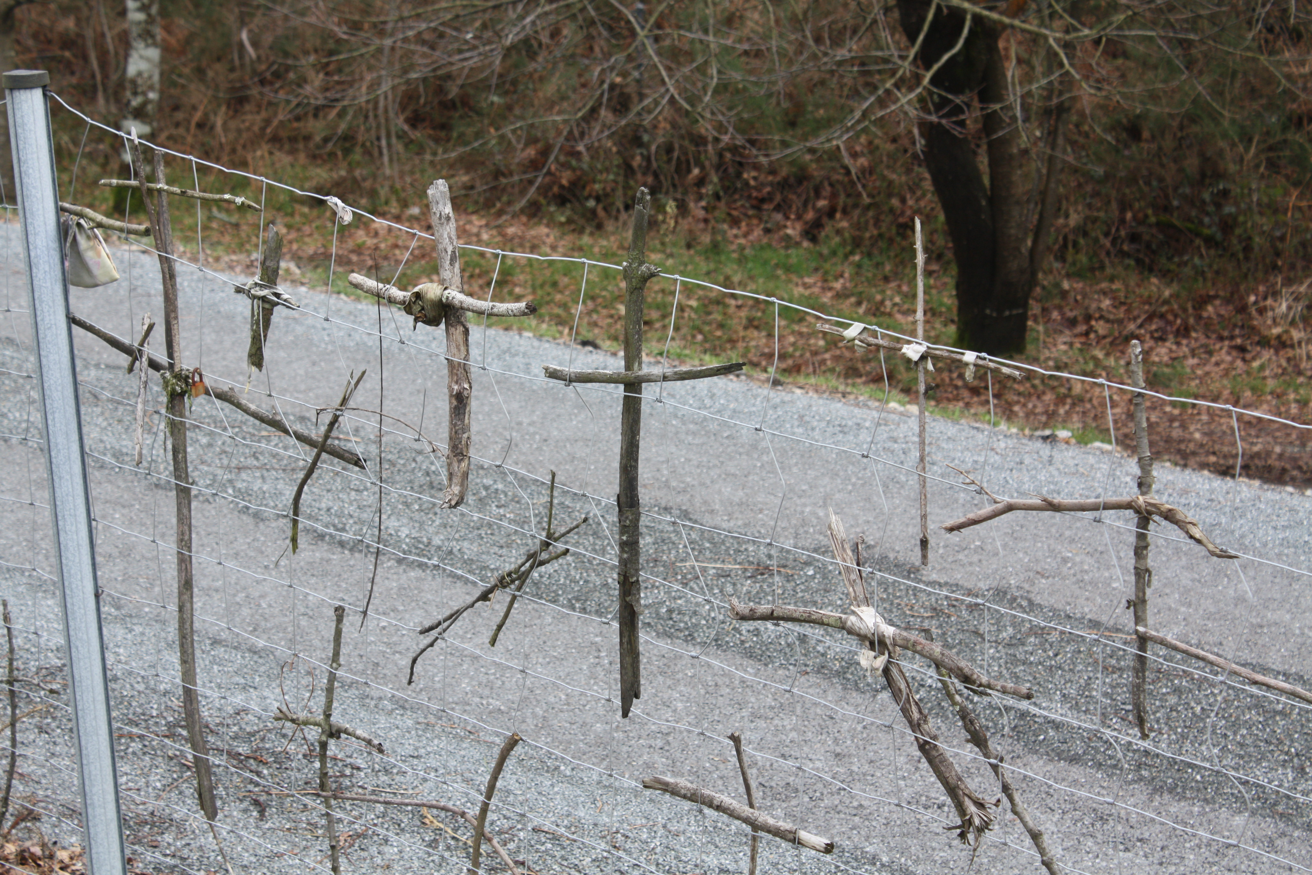 Cruces de madeira colocadas polos peregrinos, entre o Camiño Francés e a autovía, na Lavacolla (Sabugueira, Santiago de Compostela)